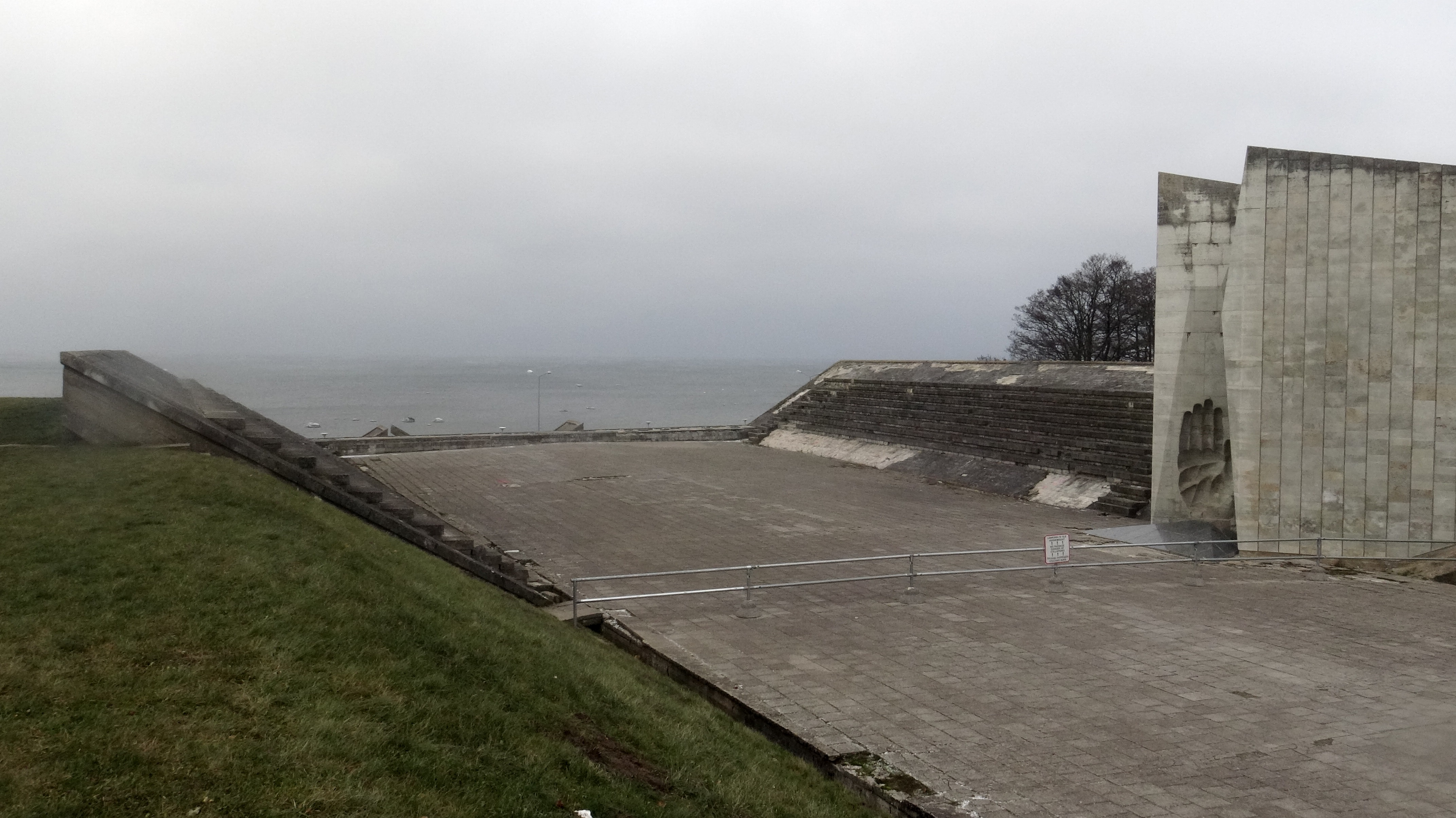 Площаль Примирения Мемориального комплекса Маарьяияги